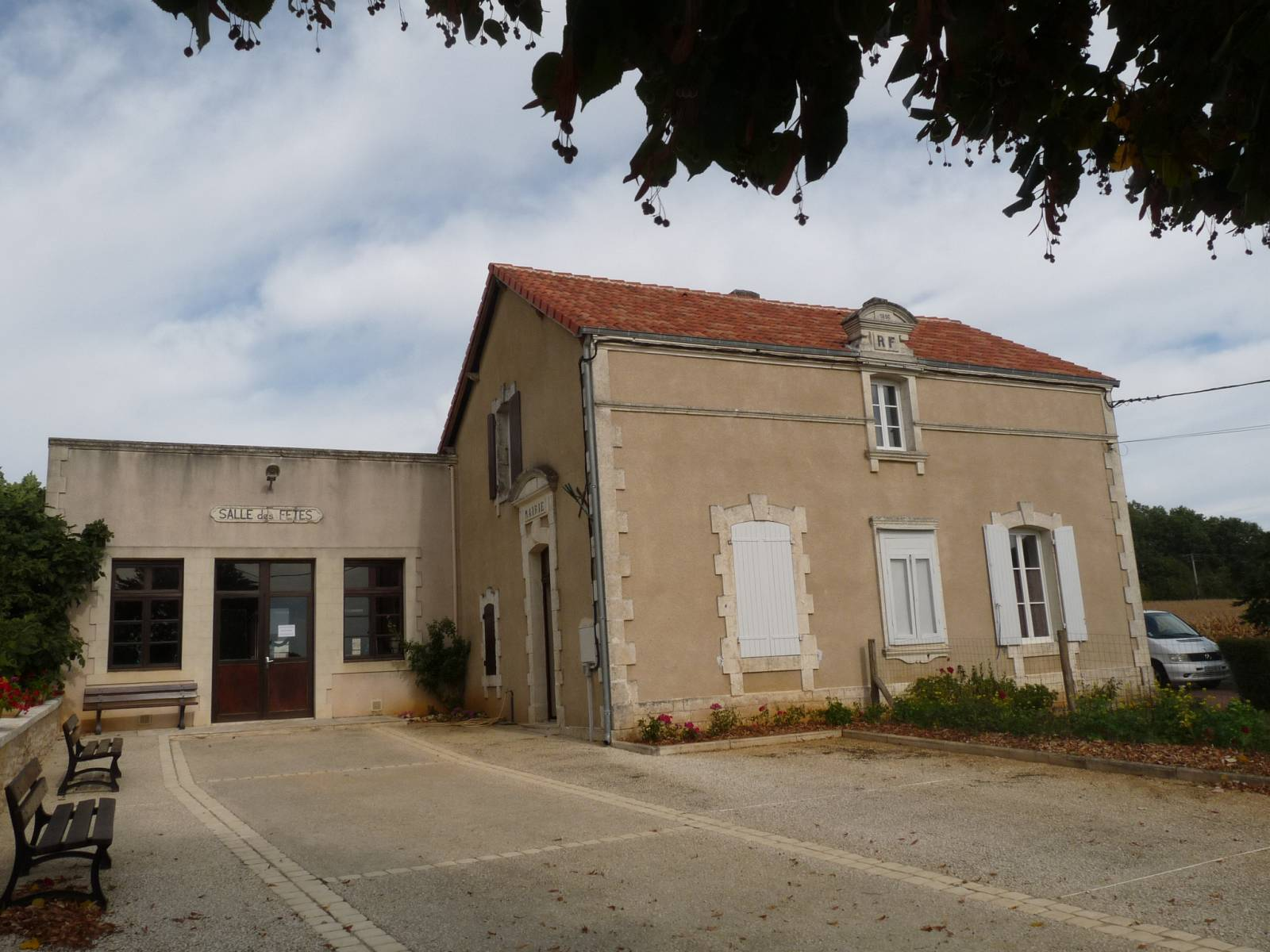 mairie de St-Georges, Charente, France